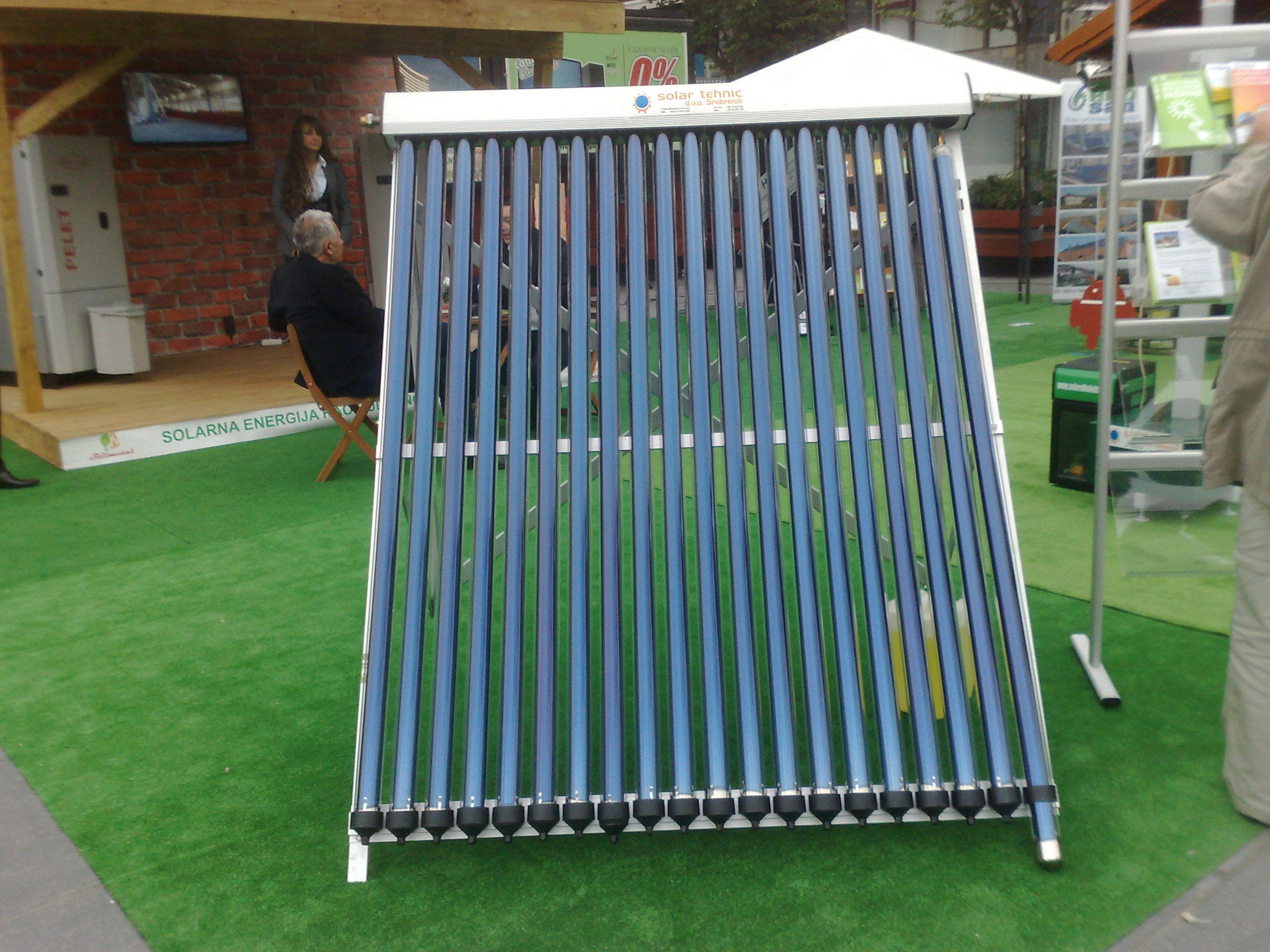 Solarni kolektor